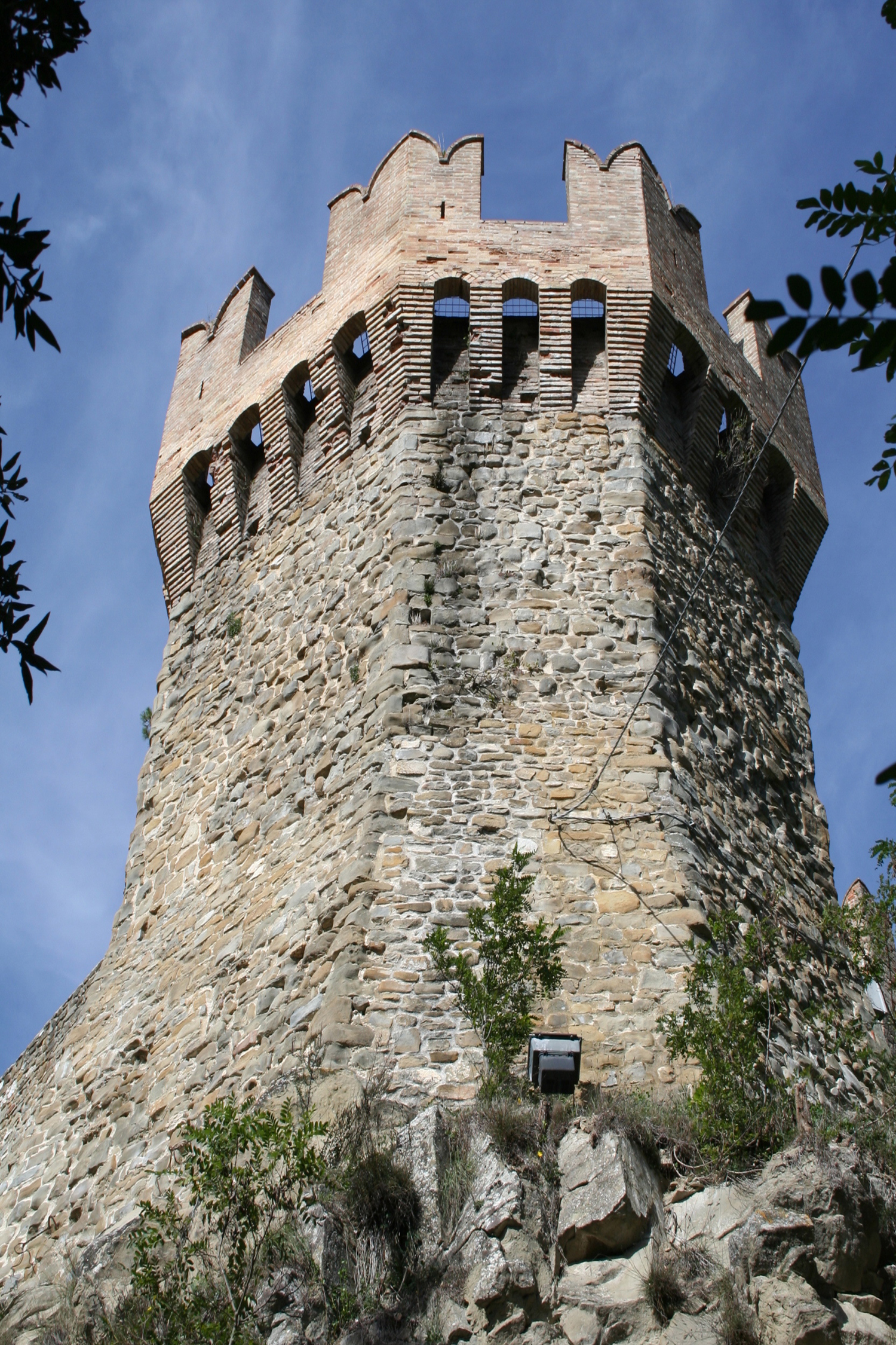 Torre a pianta esagonale della Rocca di Arquata del Tronto, in provincia di Ascoli Piceno.